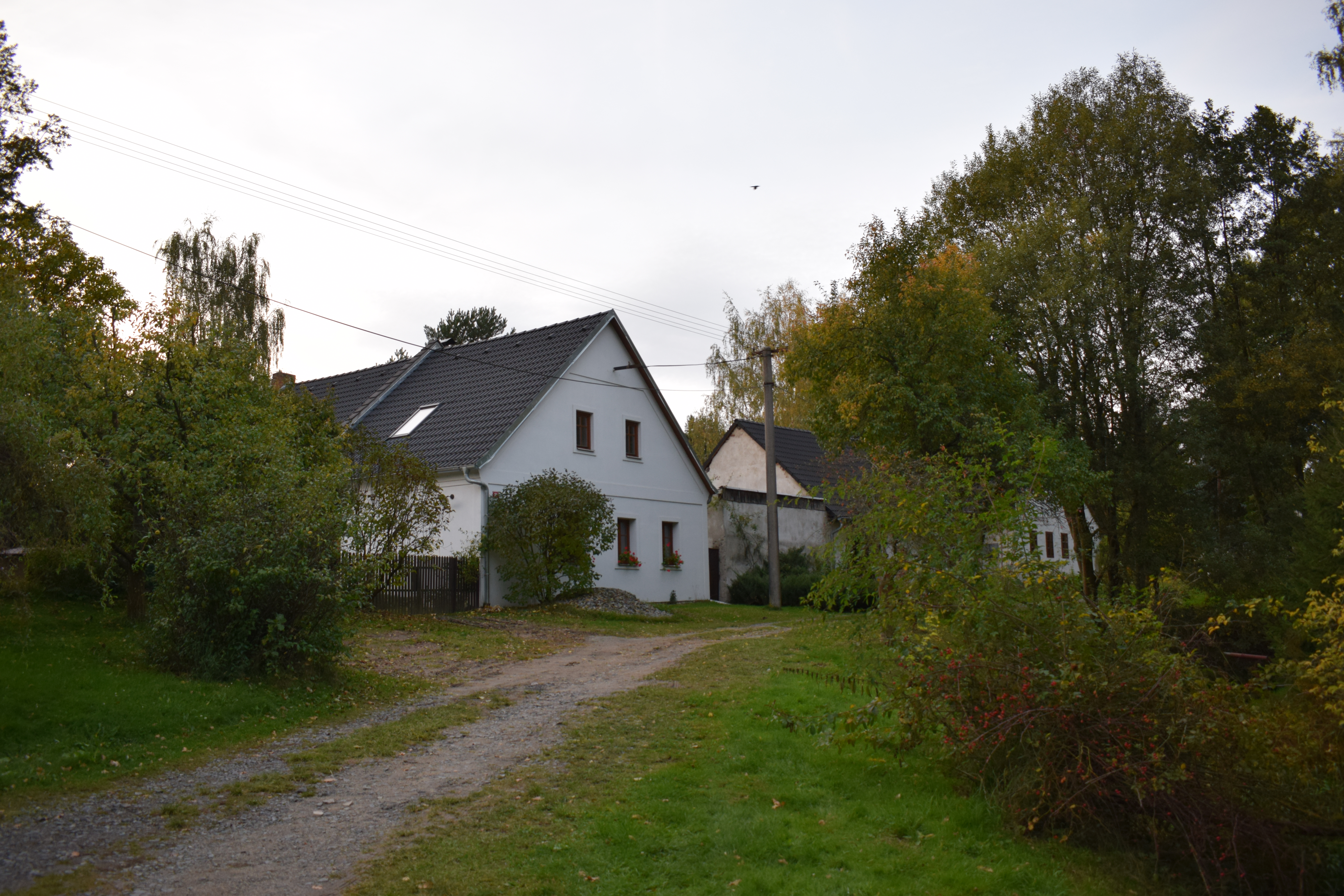 Dům čp. 21 ve Vyšném.